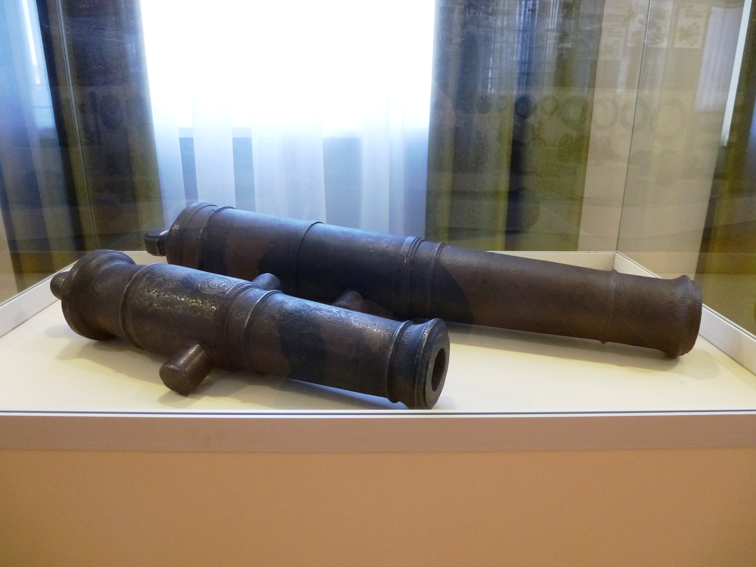 Образцы пушек, изготовленных на Александровском заводе в Петрозаводске.(источник - Национальный музей Республики Карелия)